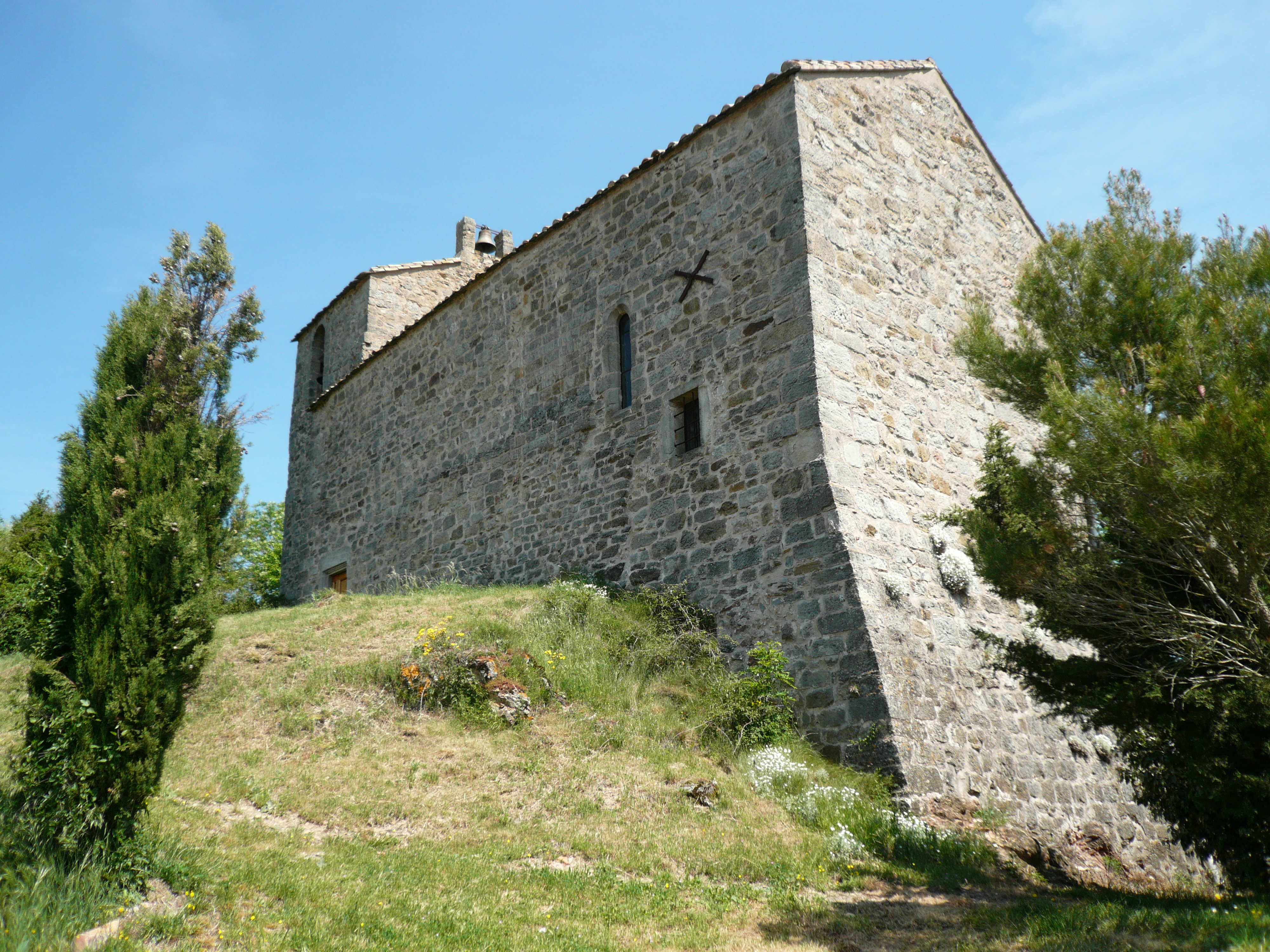 Església de Rocosèls (Erau, França).